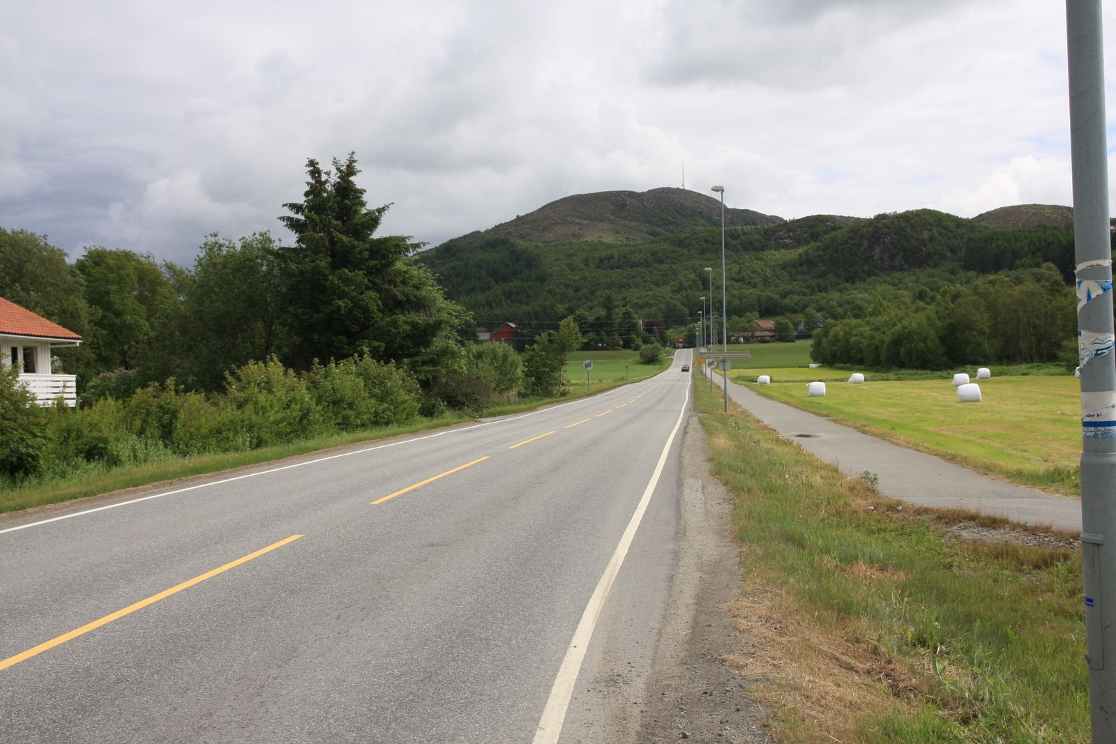 Fylkesveien 316 ved Kyrkjevegen